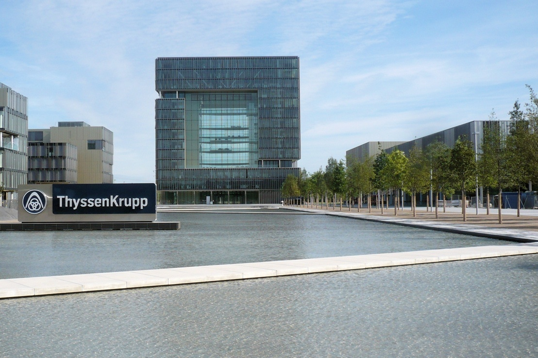 ThyssenKrupp Hauptquartier in Essen